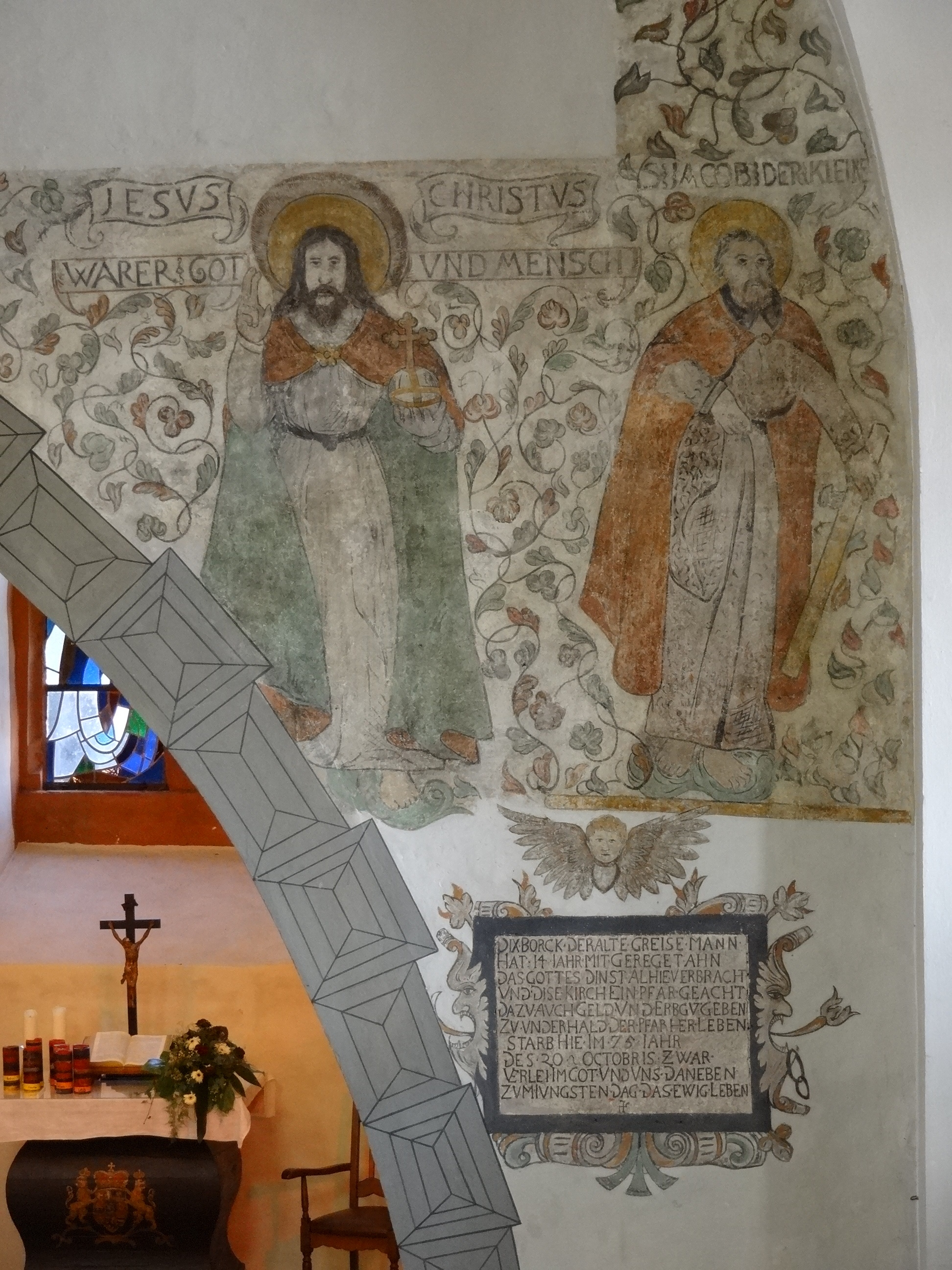 Evangelische Kirche Leihgestern